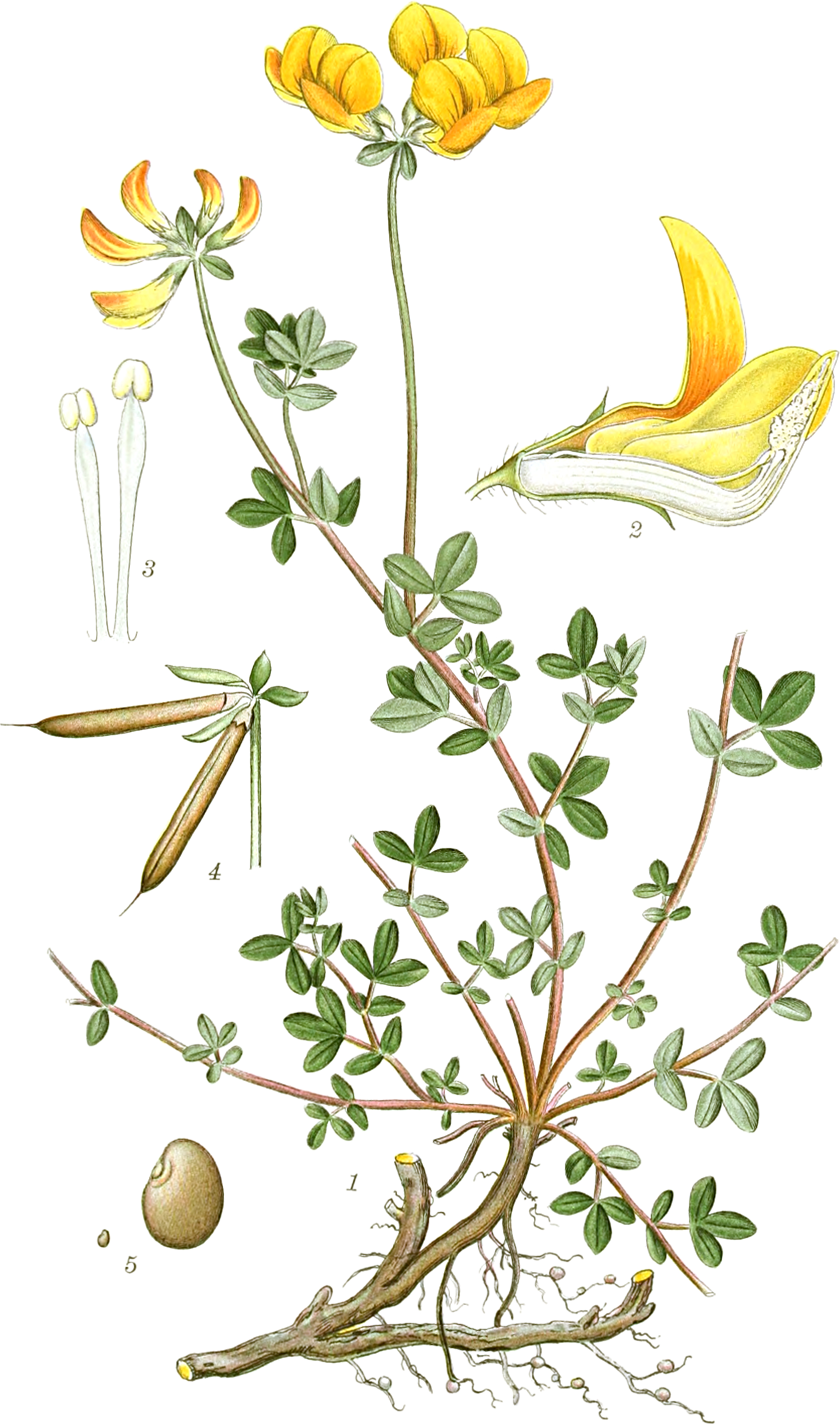 Mentz, A.; Ostenfeld, C. H.: Bilder der Nordflora. Band 2, 1917ff.Hornklee. Lotus corniculatusTav. 324. Abb. 1. Blühende Pflanze, von denen die meisten Stiele keimen. Abb. 2. Blüte im Längsschnitt (3/1). Abb. 3. 2 Staubblätter als freie Teile (10/1). Abb. 4. Reife Hülsen. Abb. 5. Samen (1/1 und 8/1).